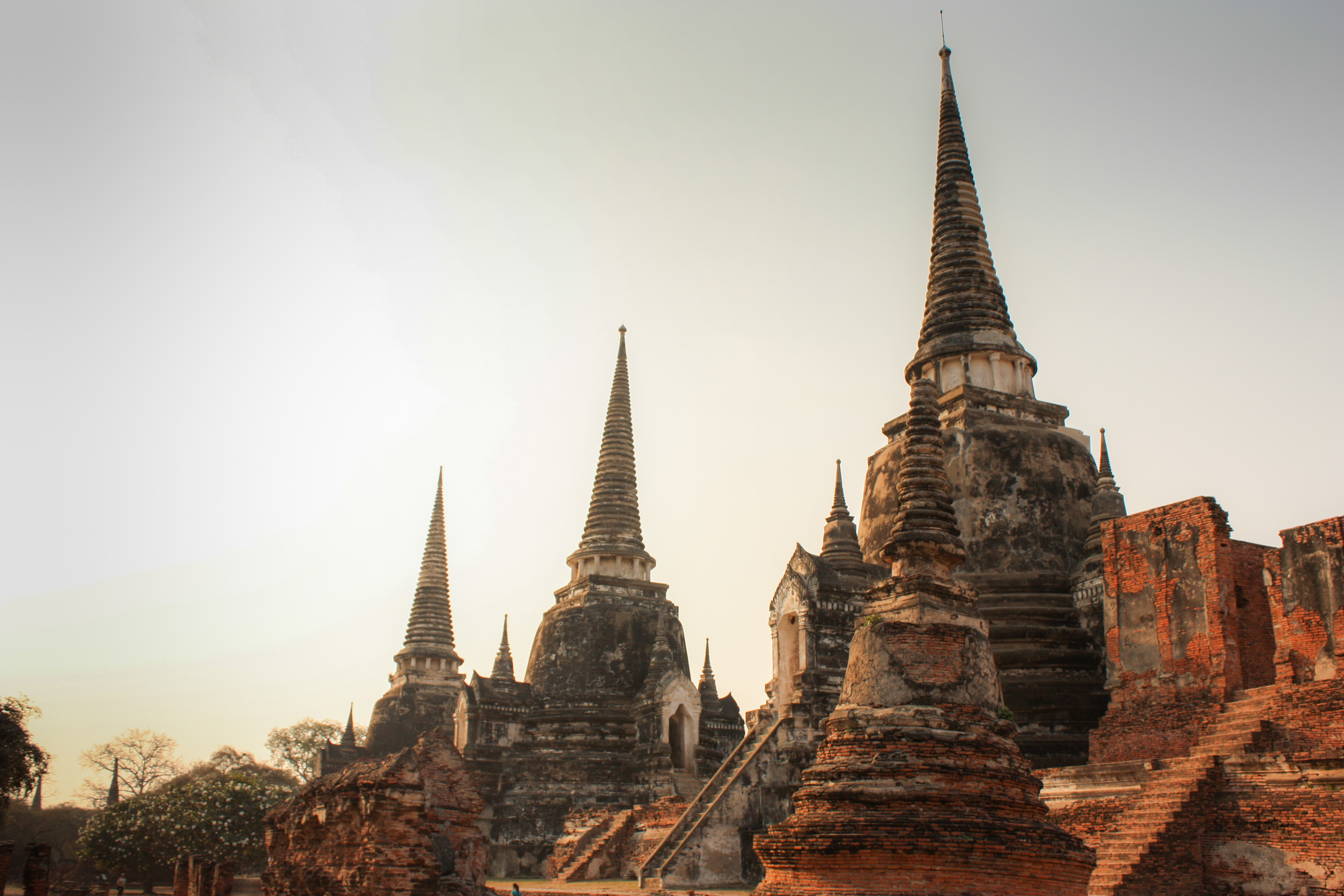 วัดพระศรีสรรเพชญ์ อยุธยา